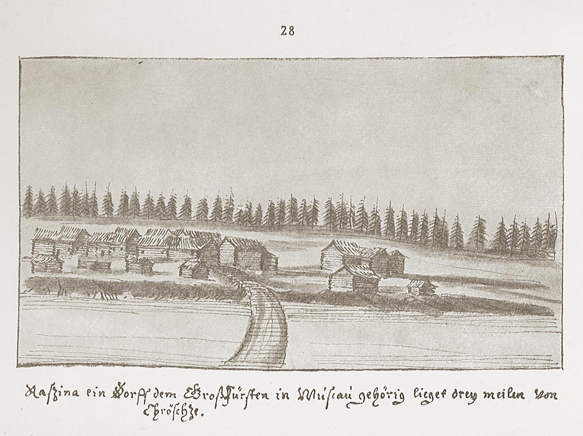 Рахино